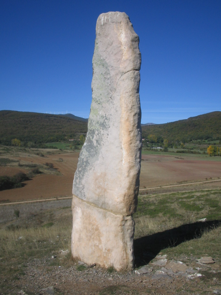 Menhir prehistórico llamado El Cabezudo, en Valdeolea (Cantabria).